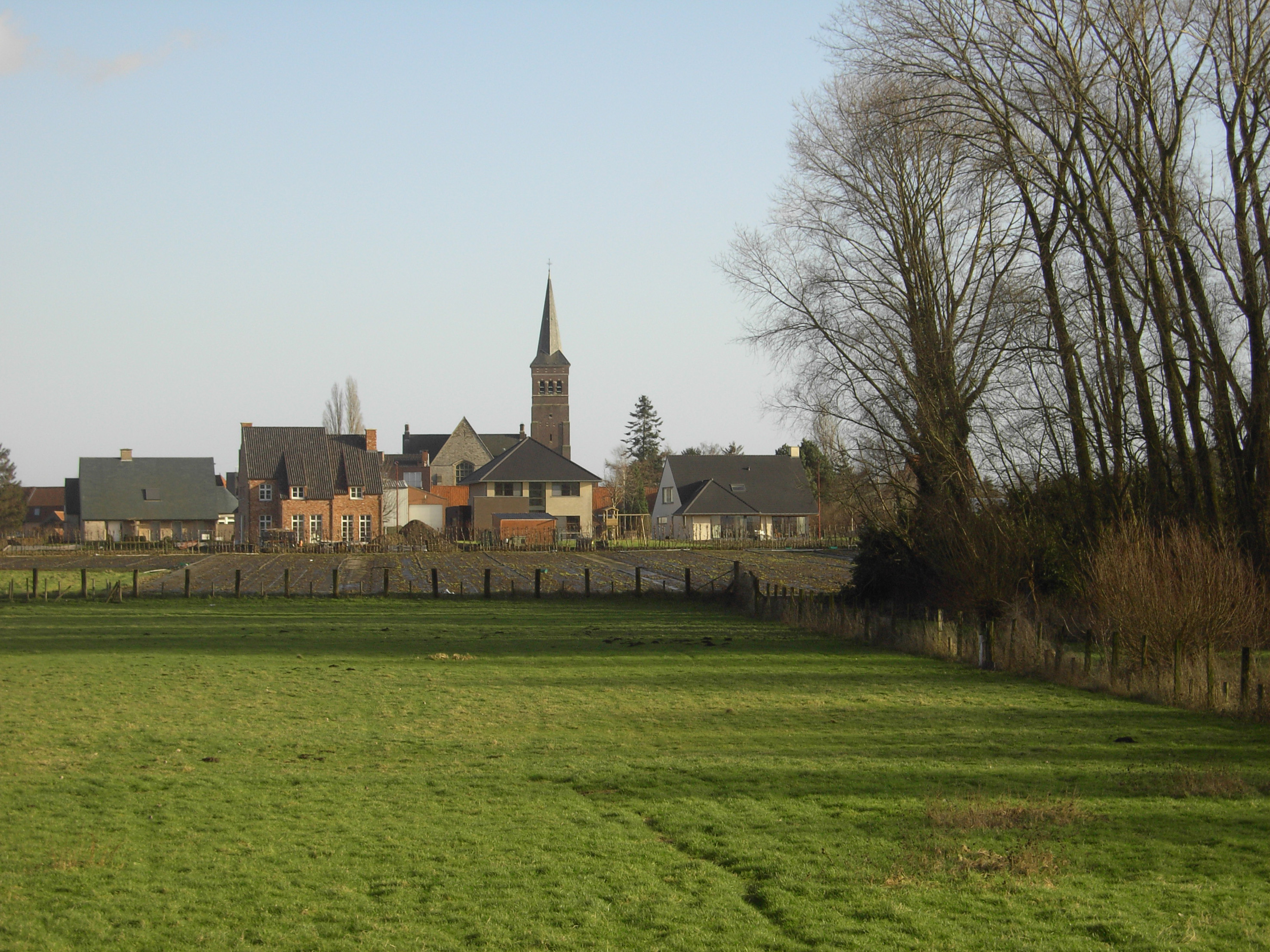 Vosselare in Nevele - Vosselare gezien vanaf het Schipdonkkanaal.